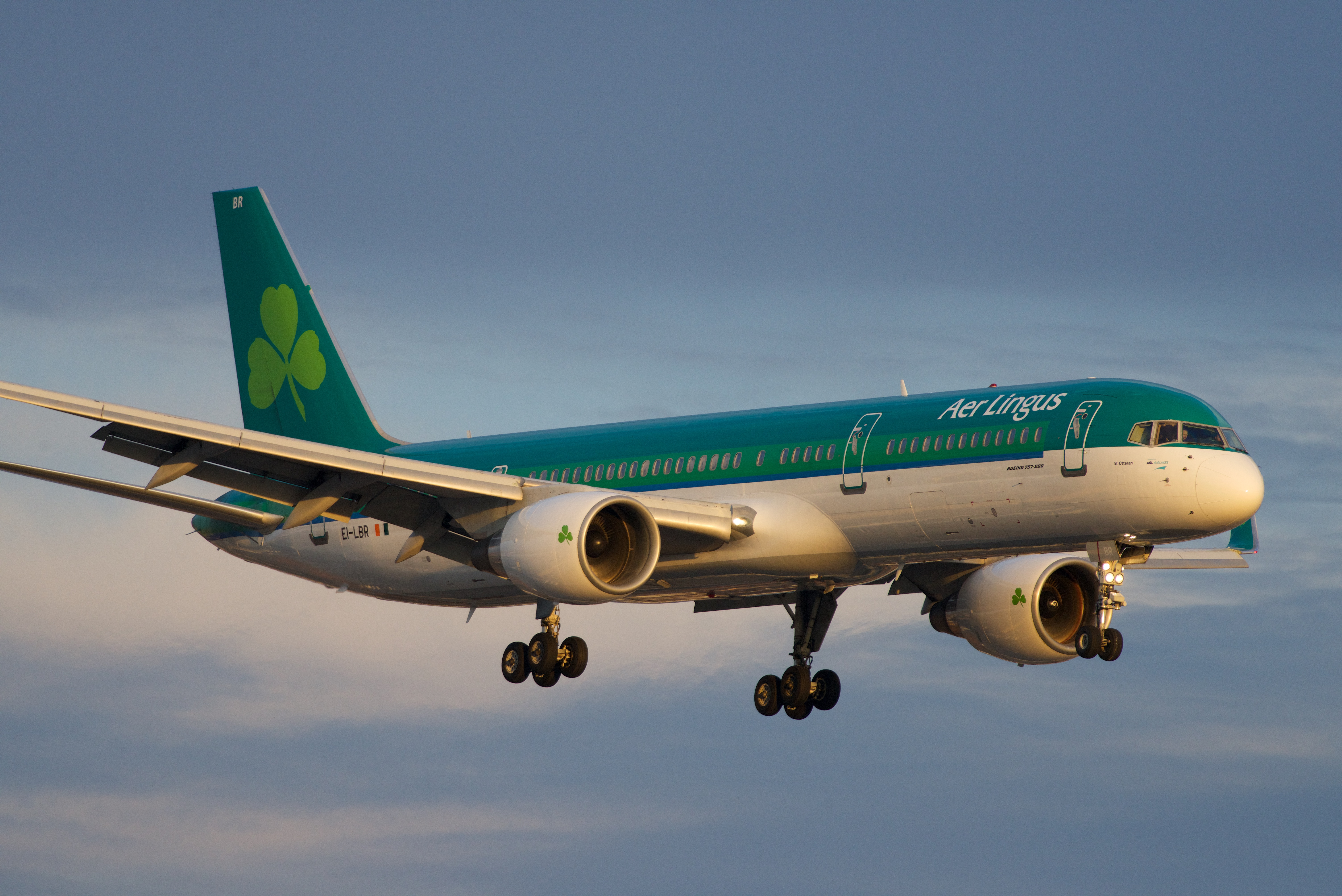 Evening arrival YYZ